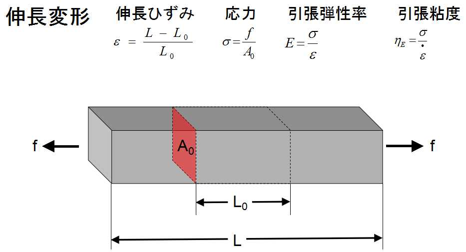 単純な伸長変形のモデル。L_0は元長、Lは変形後長さ、εは伸長ひずみ、fは力、A_0は変形前における力と垂直な断面積、σは応力、Eは伸長弾性率、η_Eは伸長粘度、上にドットの付いたεは伸長ひずみの時間微分である。